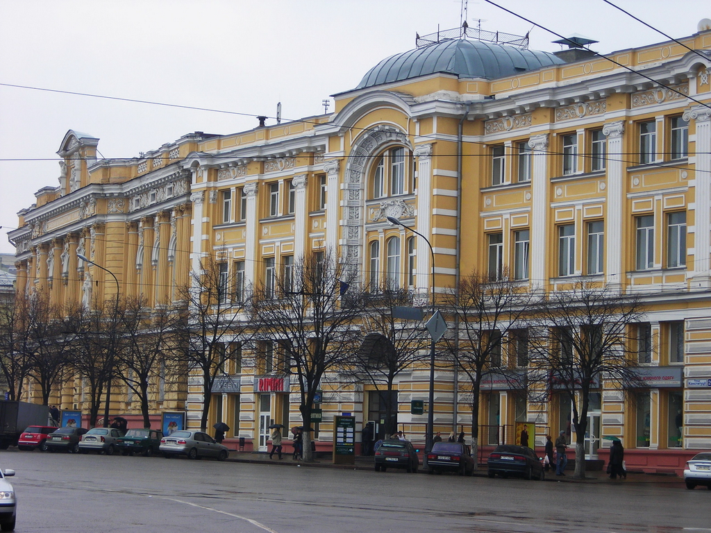 Площадь Конституции (Харьков). Дом Науки и Техники. Арх. А.Н. Бекетов